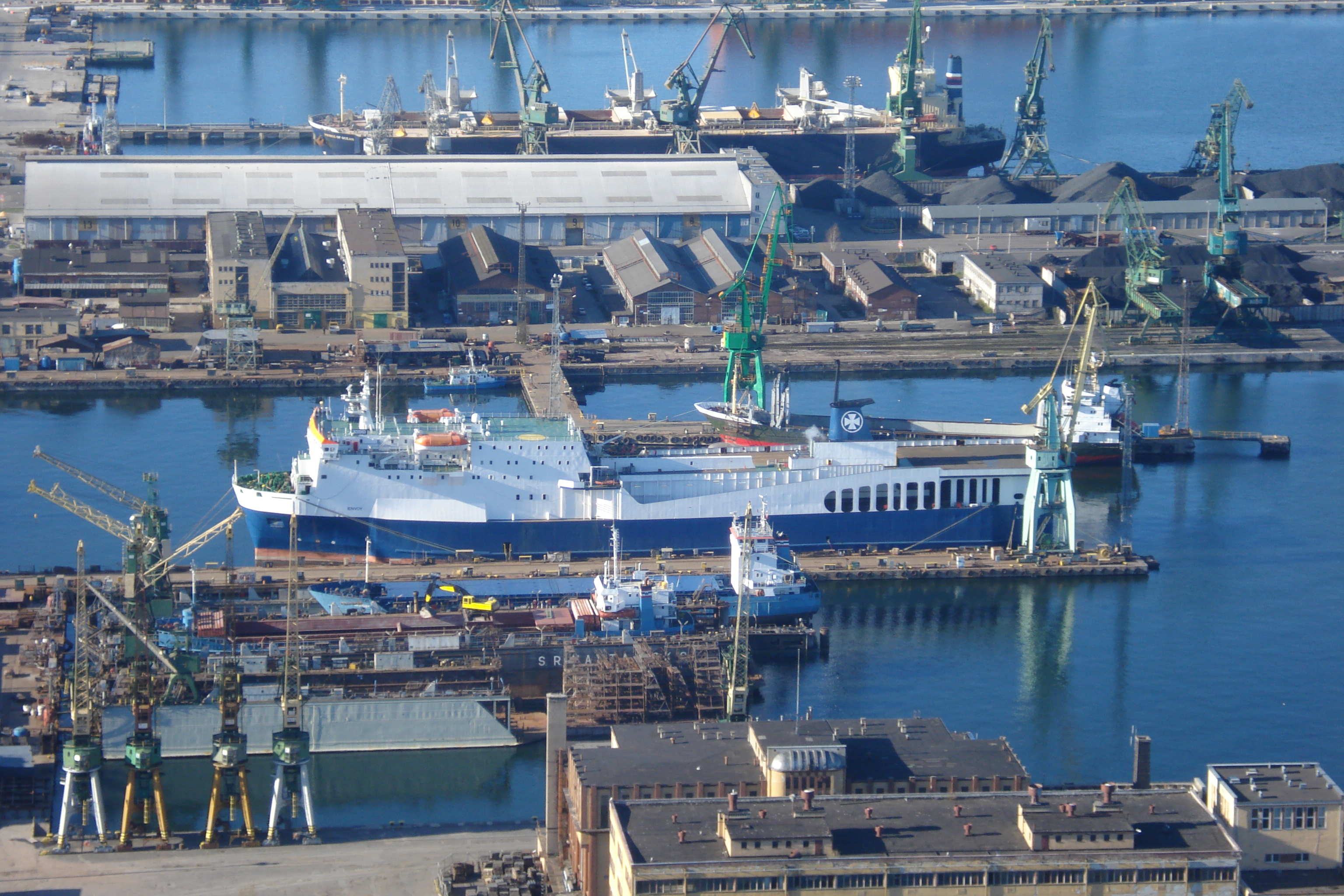 Gdynia z "lotu ptaka"